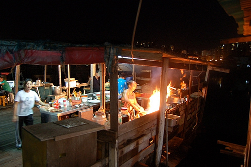 Hong Kong dai pai dong in Nam Sang WaiHong Kong dai pai dong